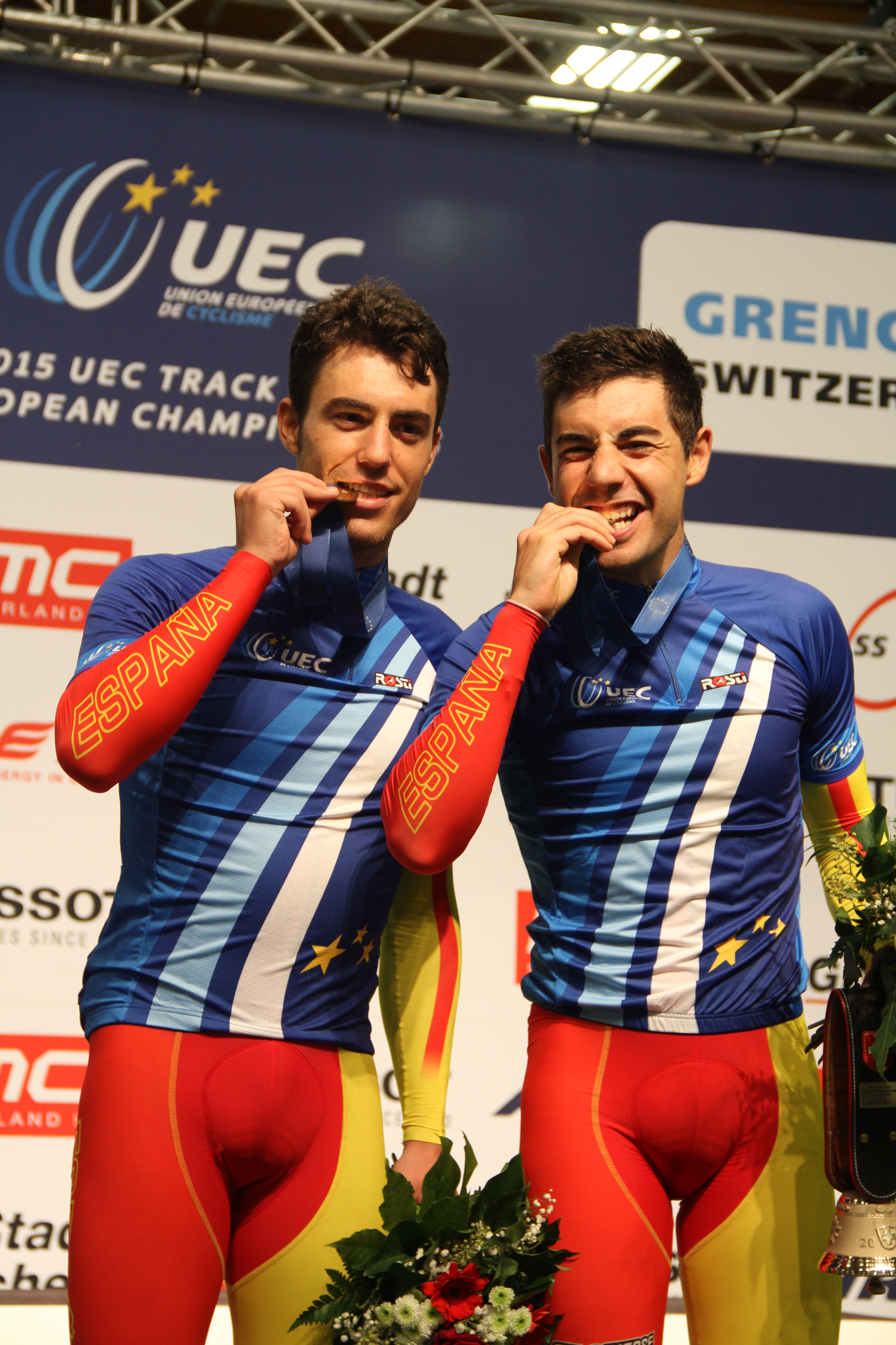 Albert Torres (l.) und Sebastían Mora, Europameister im Zweier-Mannschaftsfahren The making of this document was supported by the Community-Budget of Wikimedia Germany.